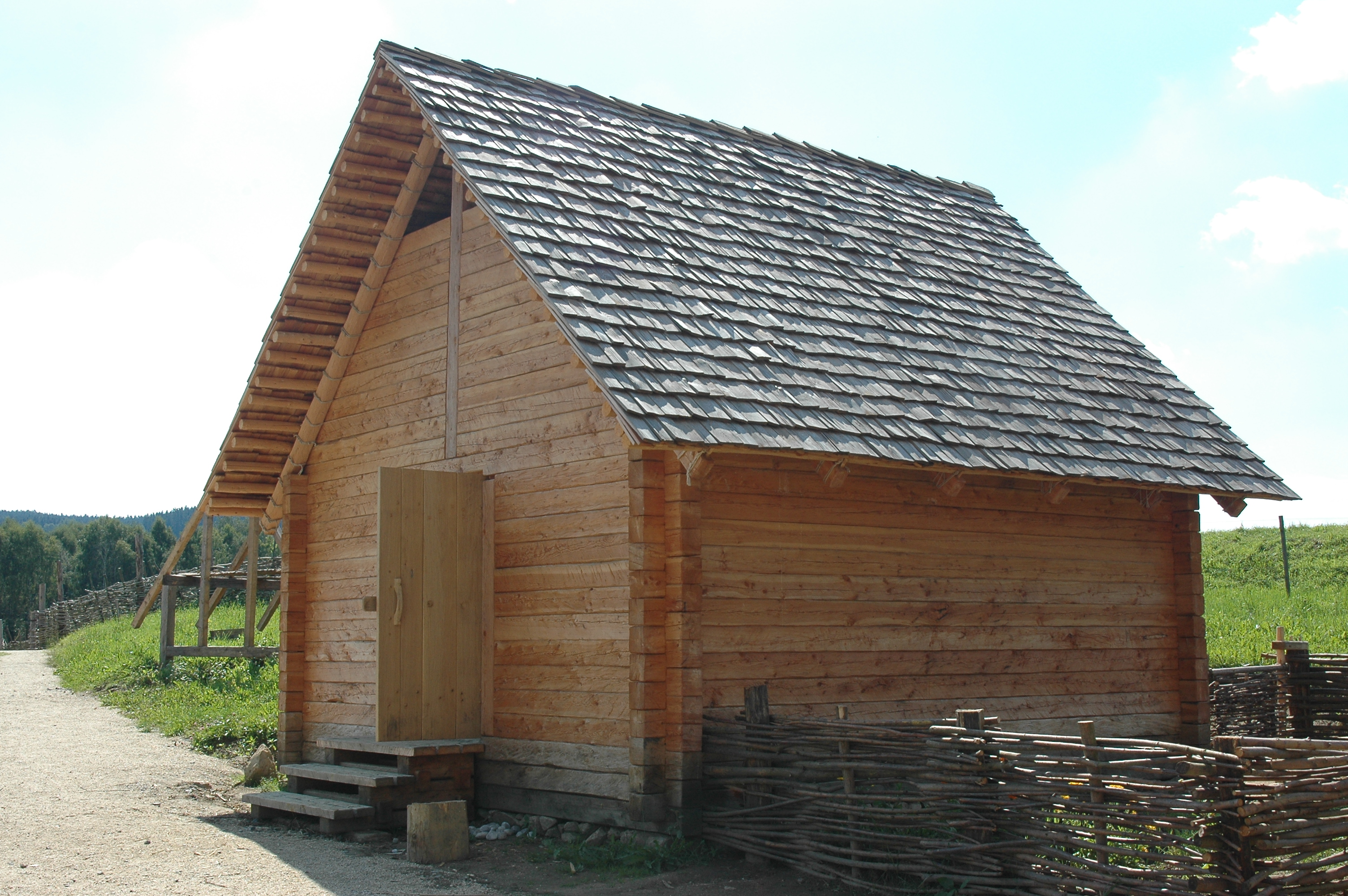 Rekonstruktion eines slawischen Blockhauses in der frühmittelalterlichen Siedlung im Geschichtspark Bärnau-Tachov